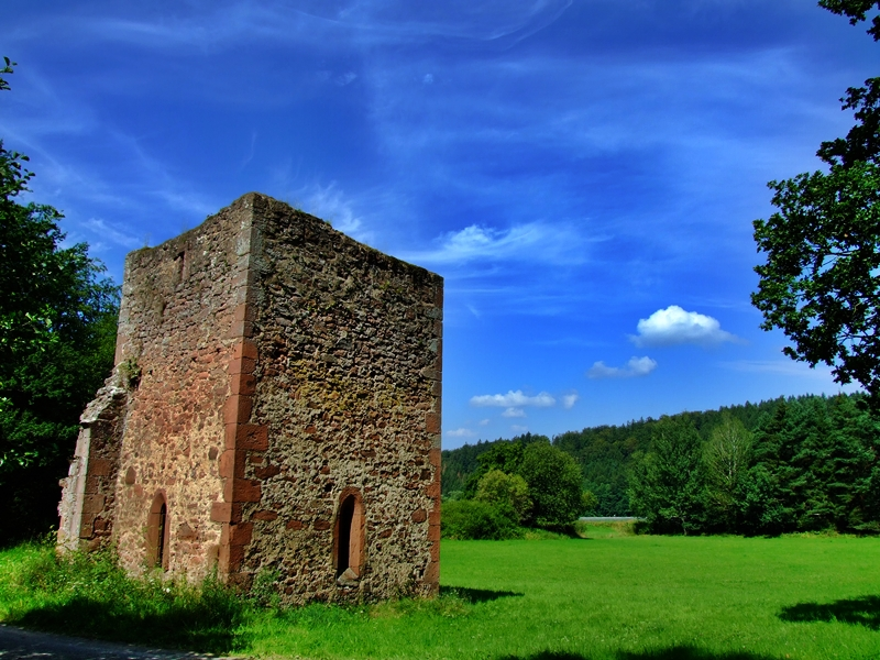 Blick auf die Ruine Gießlingskirche an der A4 zwischen HEF und Friedewald